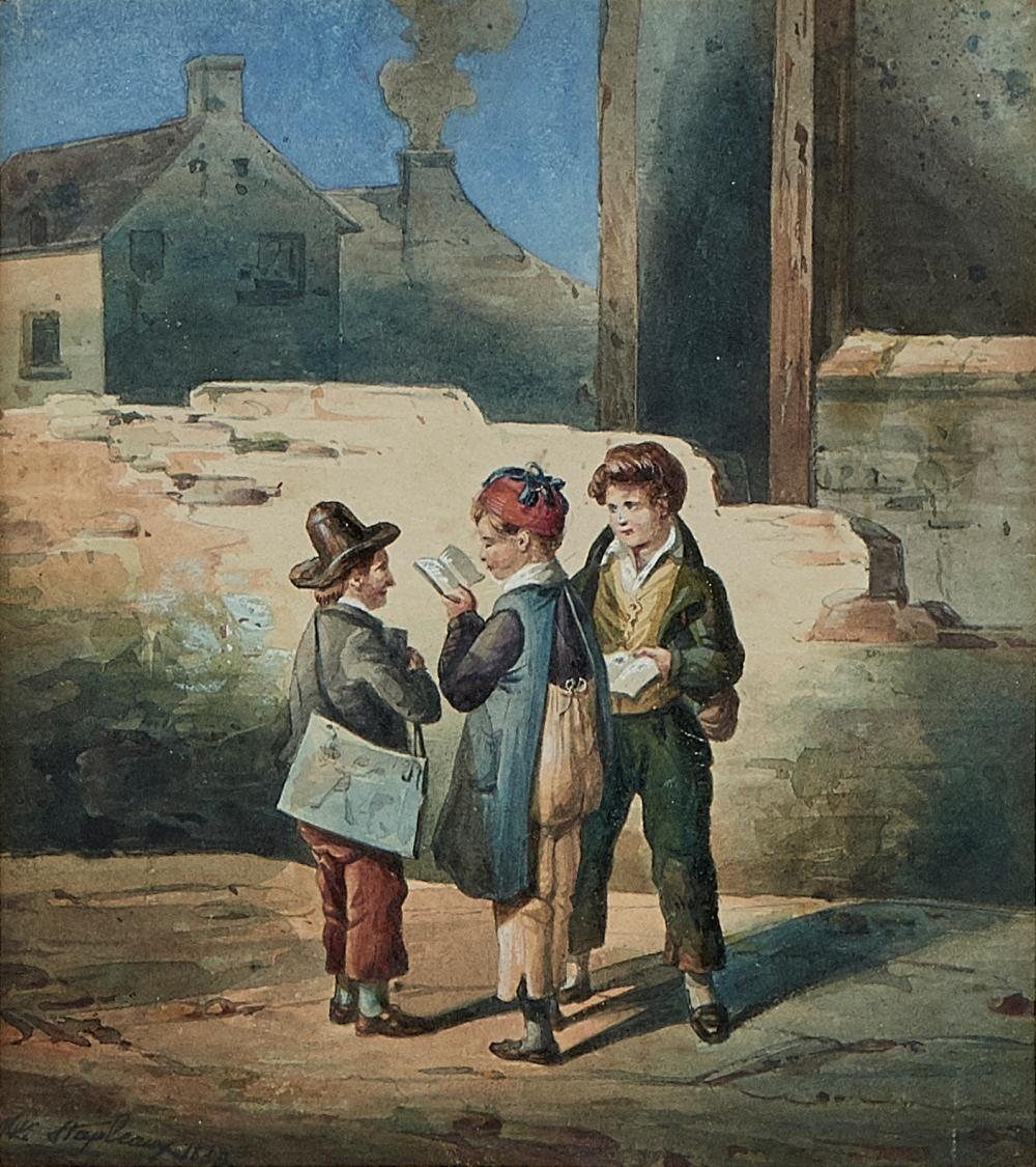 Enfants des rues